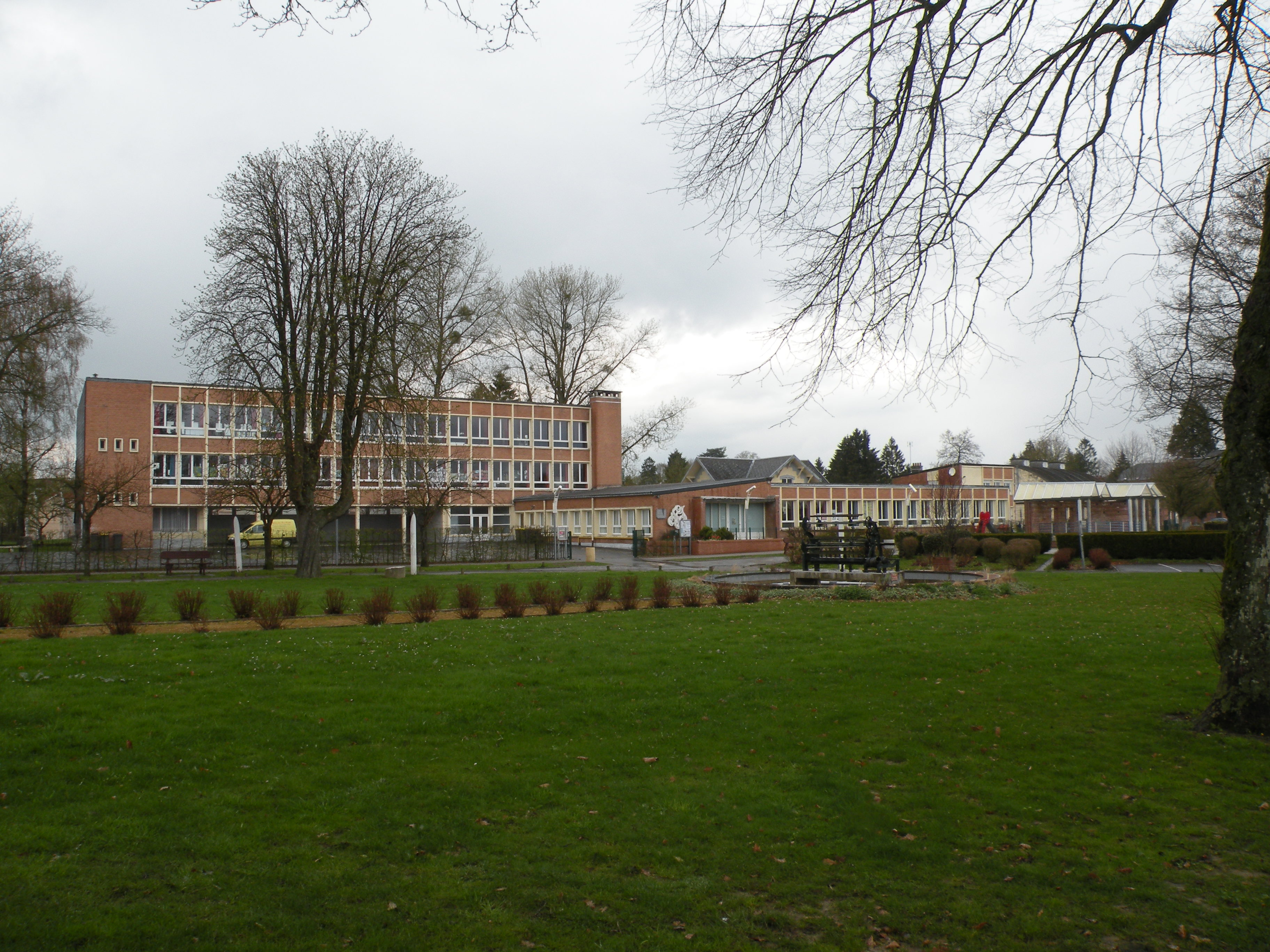 vue de Wignehies